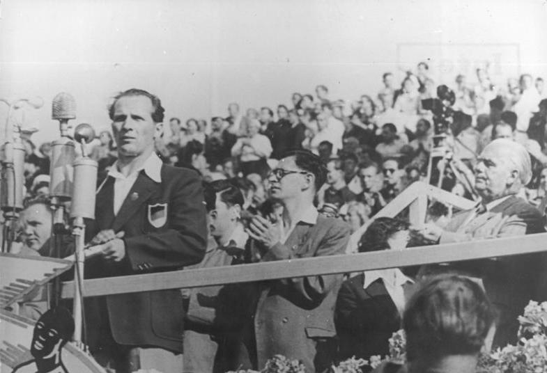 Berlin, III. Weltfestspiele, Eröffnungsfeier, Erich Honecker ADN-ZB Quasch.Schä-5.8.1951 Eröffnung der III.Weltfestspiele in Berlin am 5.8.1951 UBz: Der erste Vorsitzende der FDJ Erich Honecker spricht.